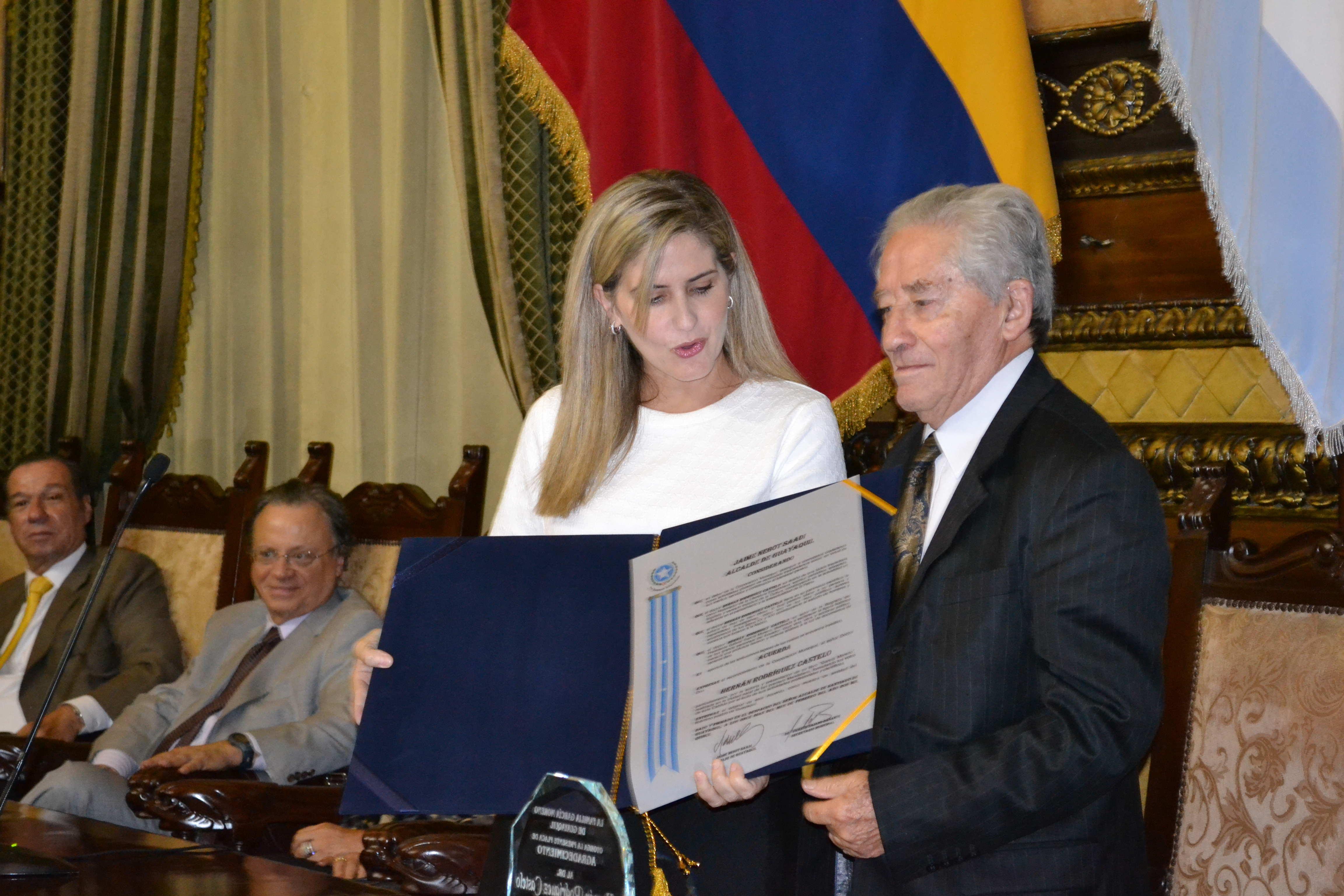 Hernán Rodríguez Castelo, escritor ecuatoriano, recibiendo condecoración por parte del Muy Ilustre Municipio de Guayaquil. Entrega la Ab. Doménica Tabacchi Rendón, Vicealcaldesa de Guayaquil.